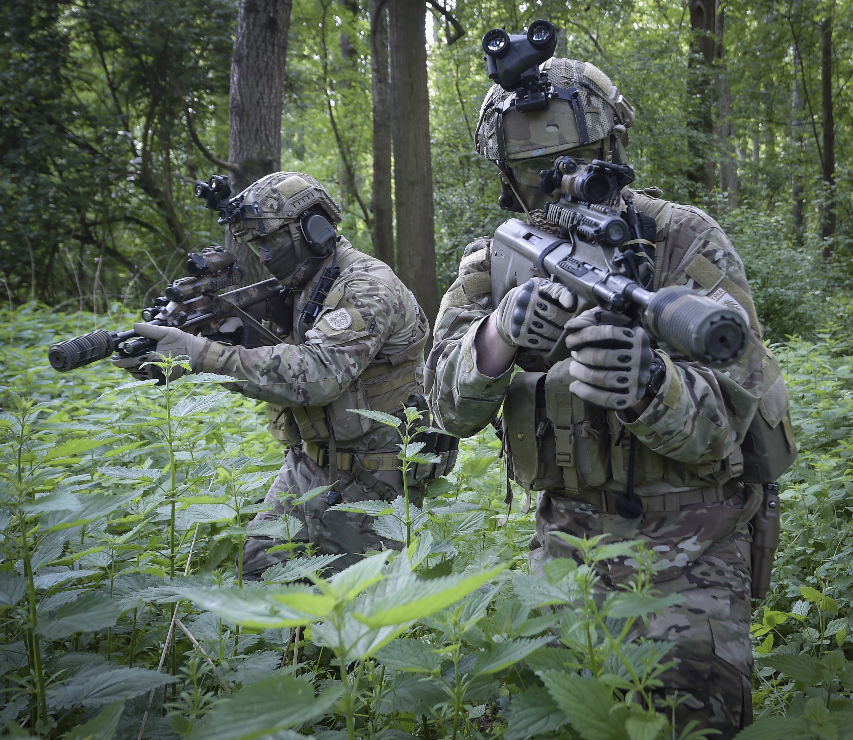 Soldaten der Spezialeinsatzkräfte beim Training.